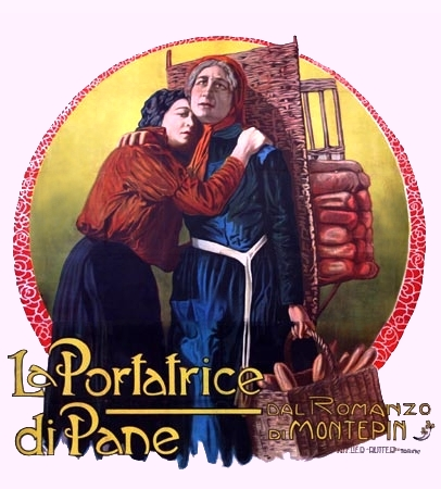 Locandina del film del 1911 di Romolo Bacchini dal titolo "La Portatrice di Pane"